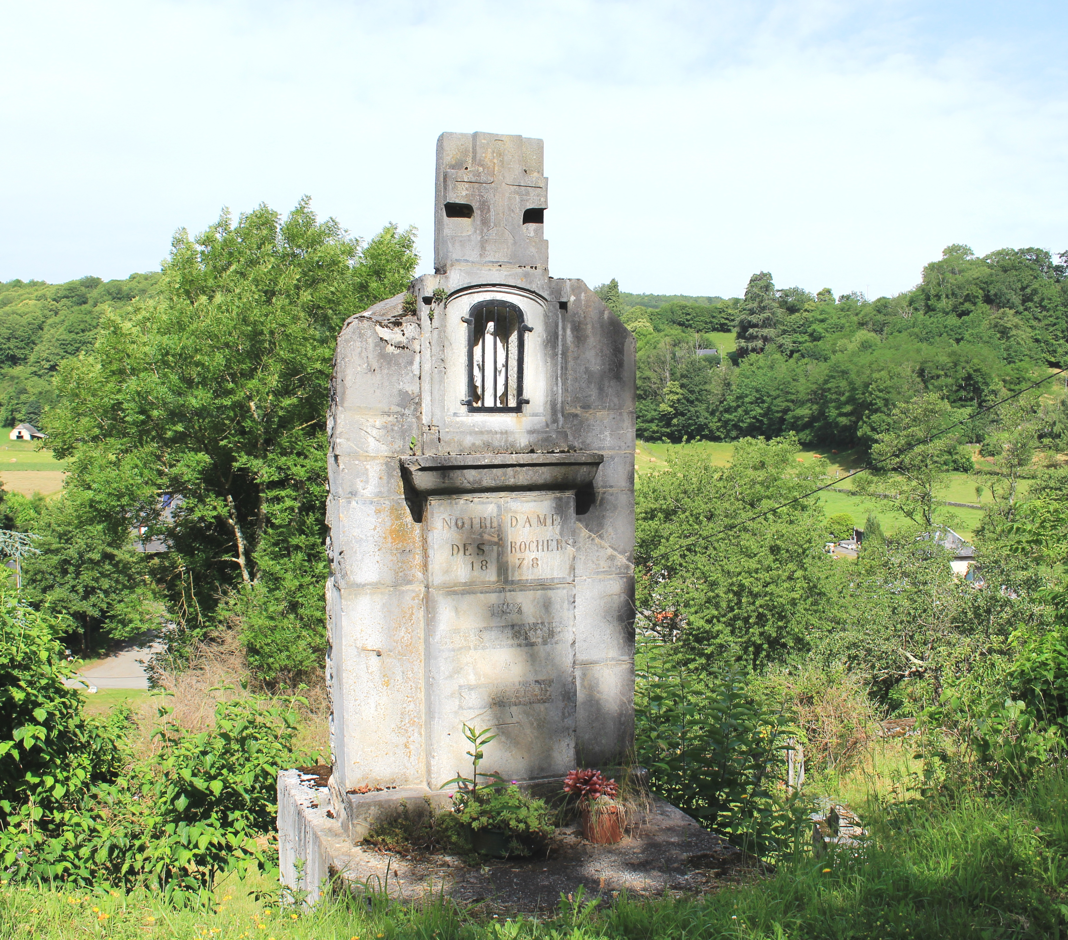 Oratoire de Bazus-Neste (Hautes-Pyrénées)